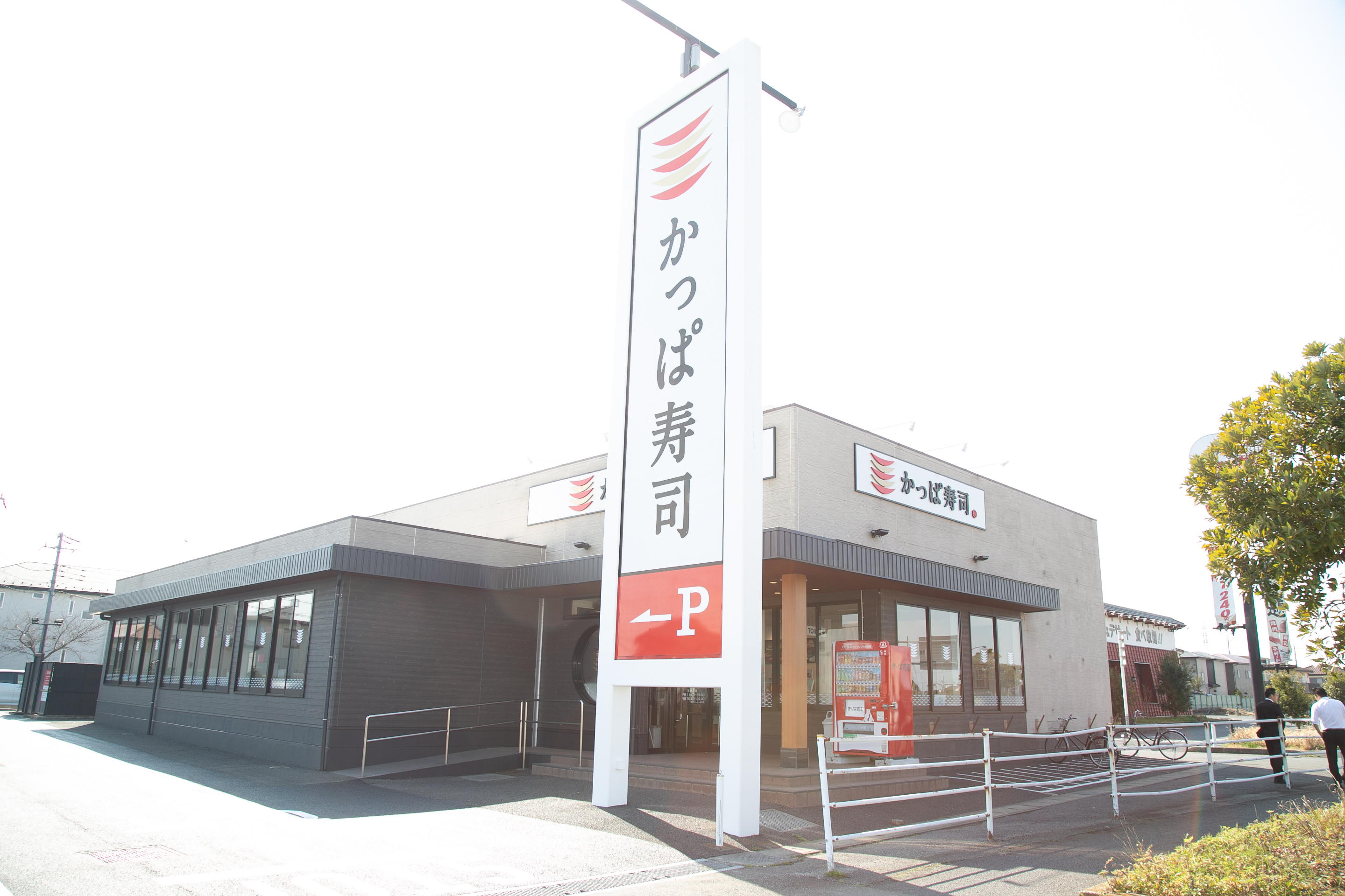 かっぱ寿司市原店外観